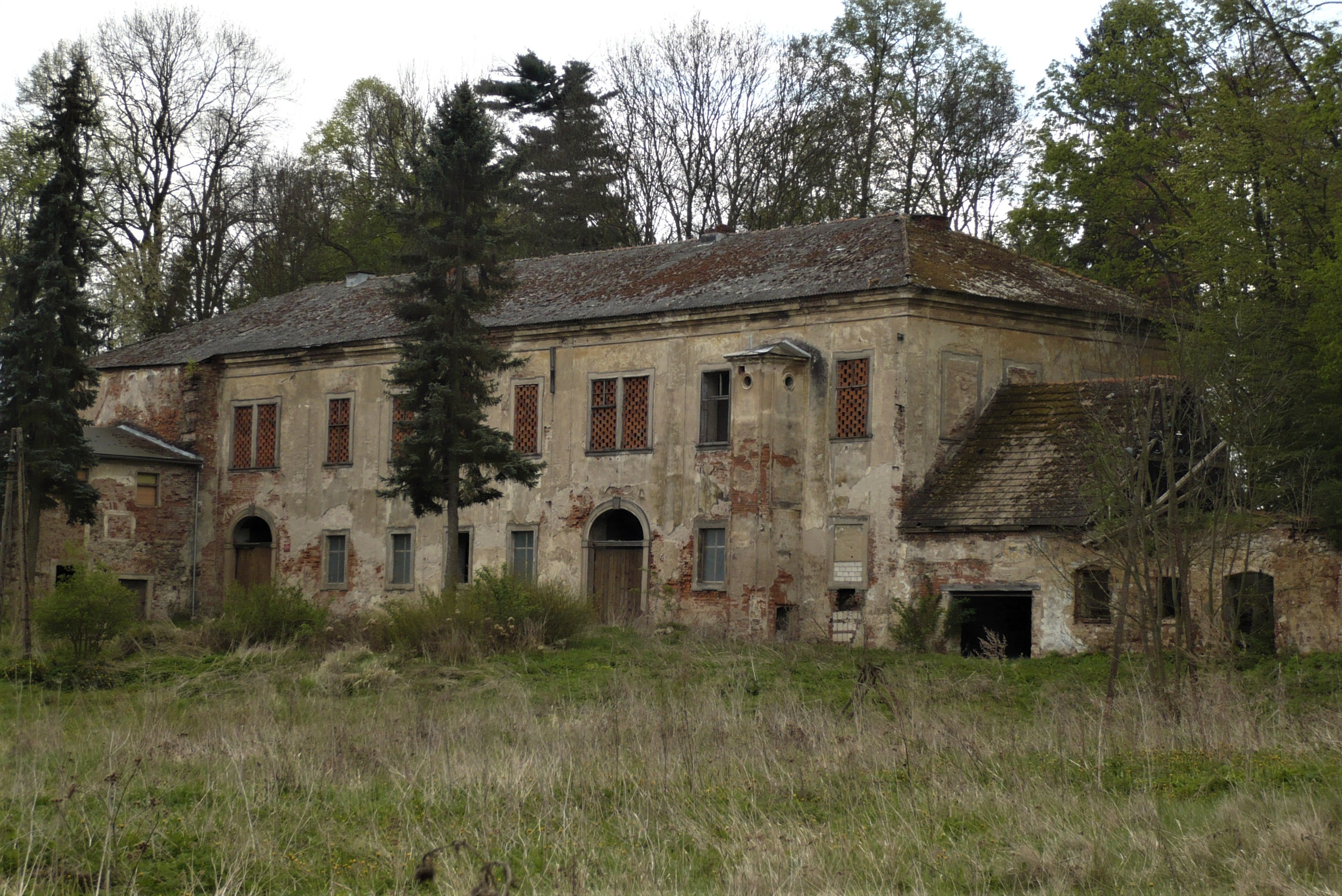 Pałac w Korytowie